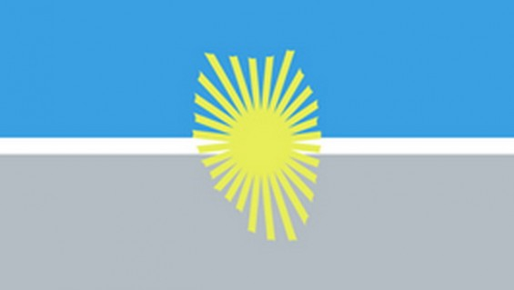 Bandera del Departamento General Alvear, Mendoza, Argentina